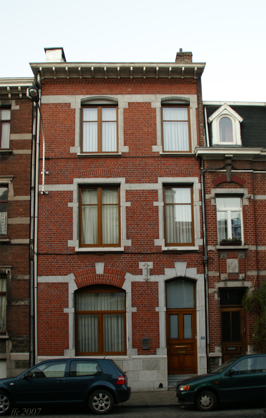 Maison où Simenon habitait de 1905-1911 au 2e étage, rue Pasteur 3 (maintenant rue Georges Simenon 25) à Liège